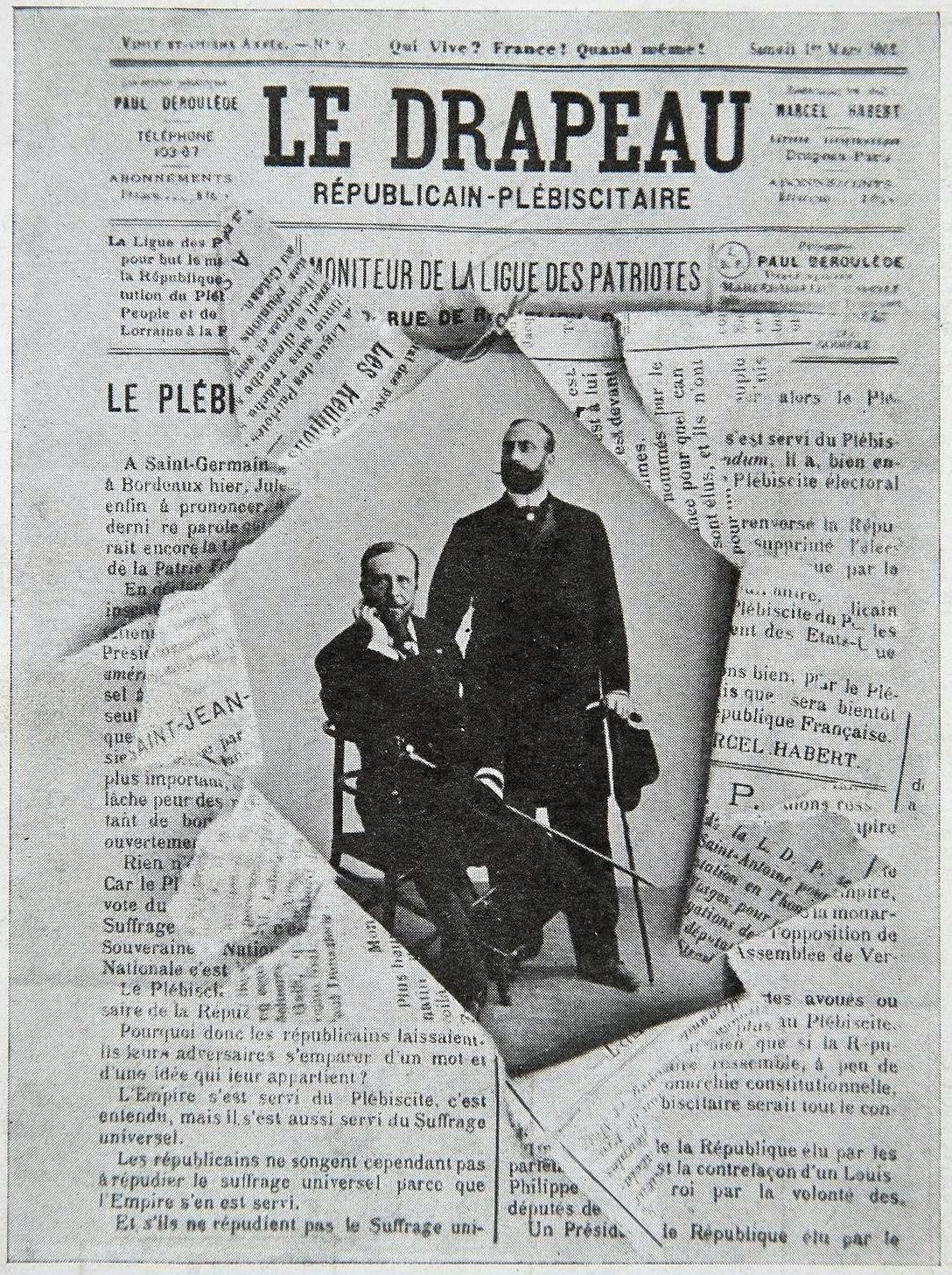 En Exil.